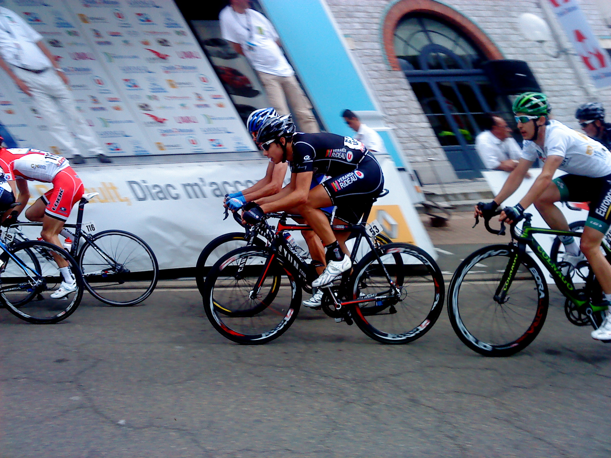 Benoît Jarrier lors de la dernière étape des Boucles de la Mayenne 2012 à Laval.